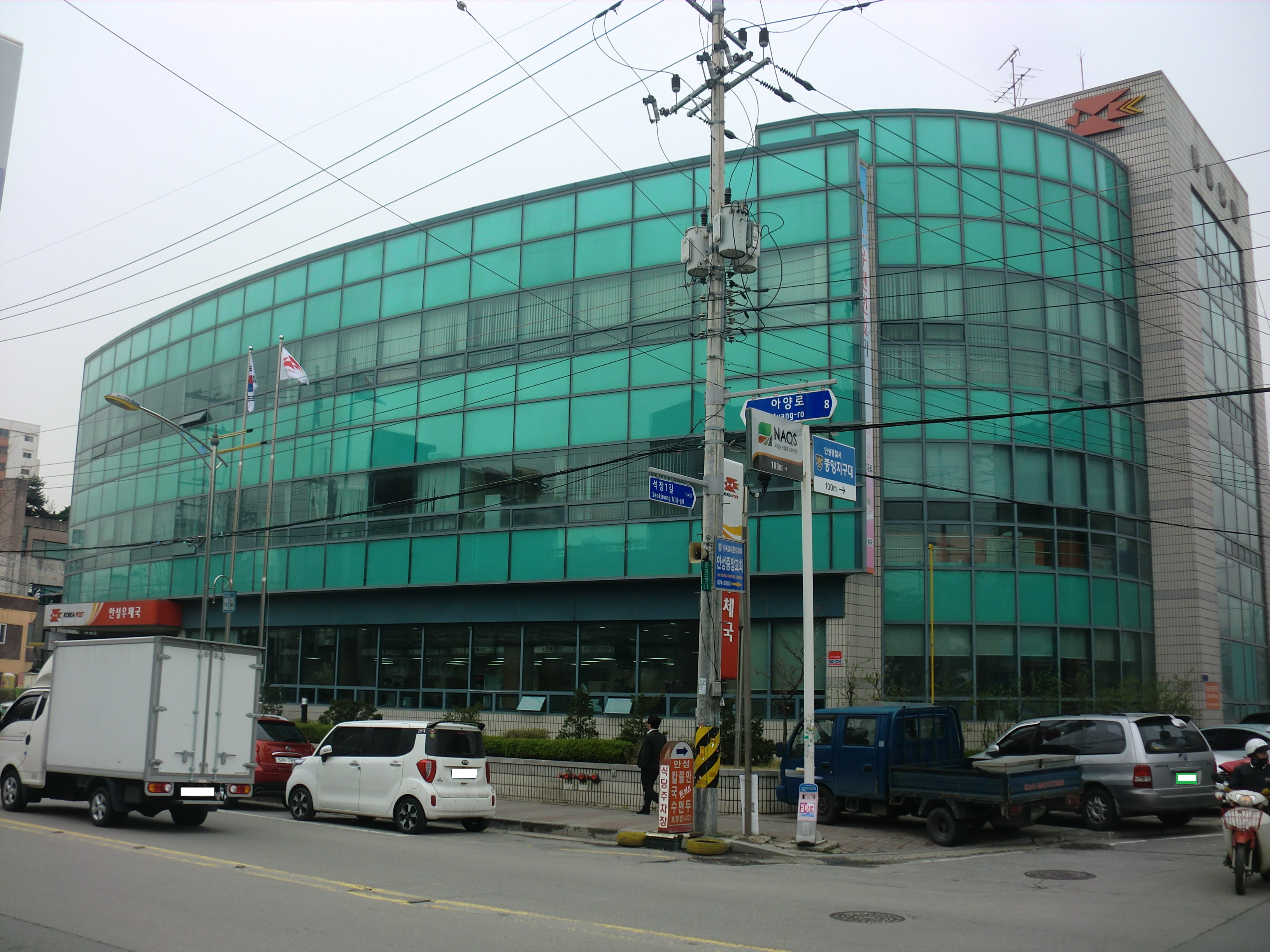 경기도 안성시에 있는 안성우체국